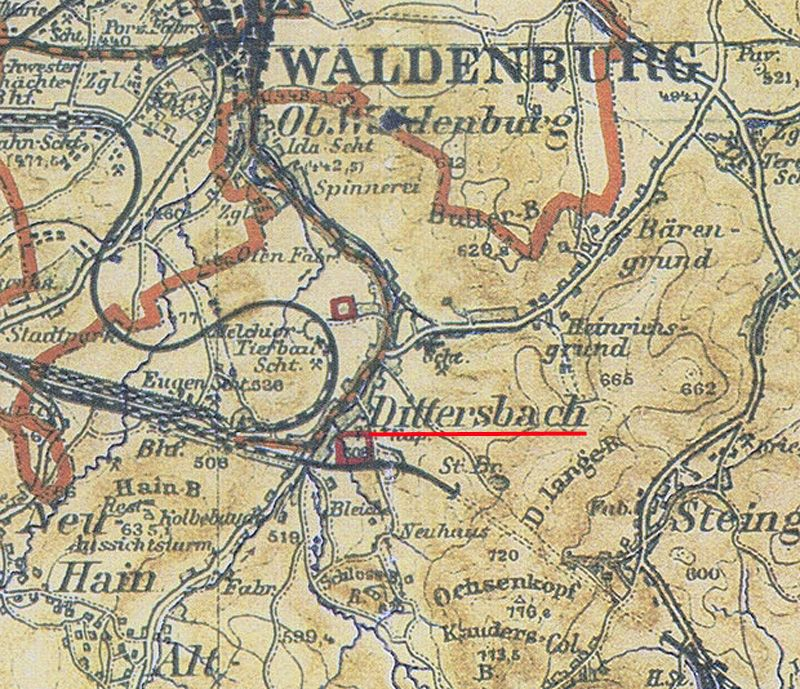 Dittersbach auf einem Ausschnitt aus der Karte des Stadt- und Landkreises Waldenburg